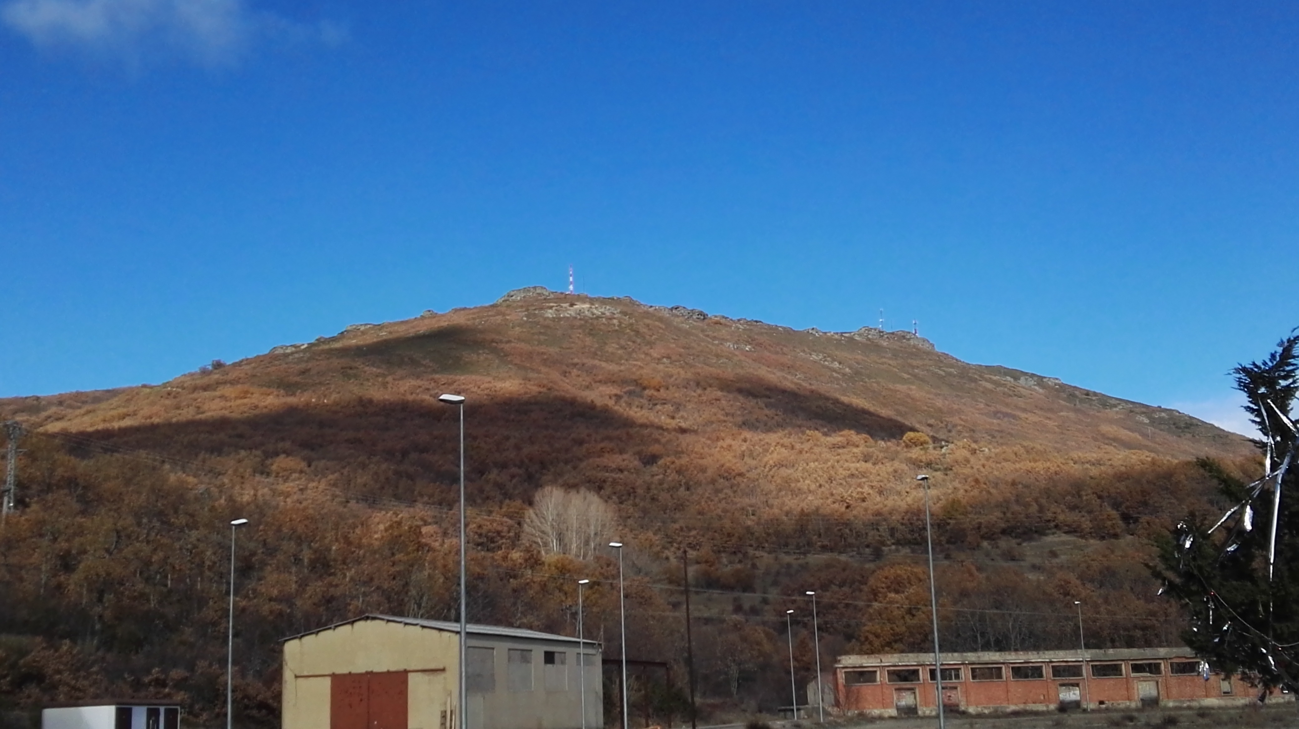 Alto de la Camperona visto desde Sotillos de Sabero en León (España)